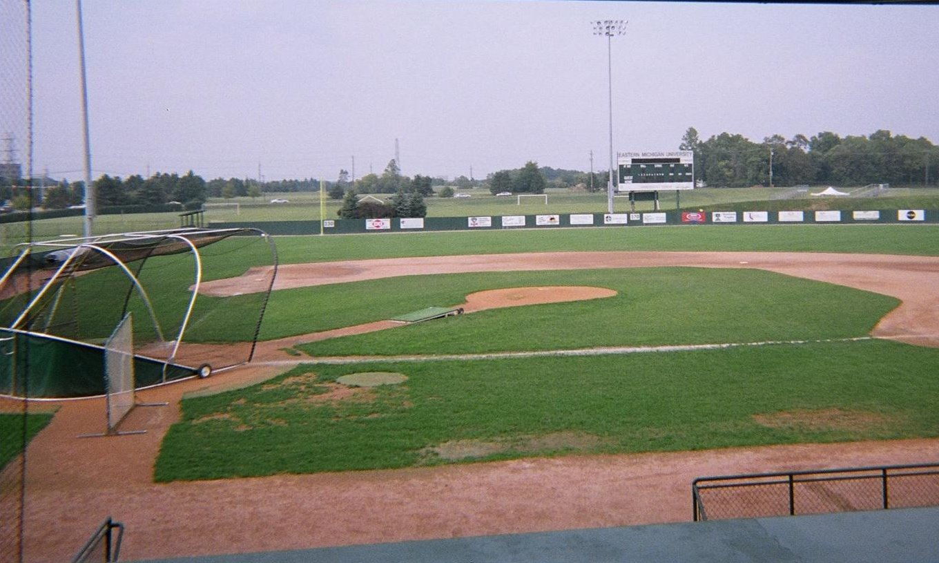 Oestrike Stadium looking towards Huron River Drive